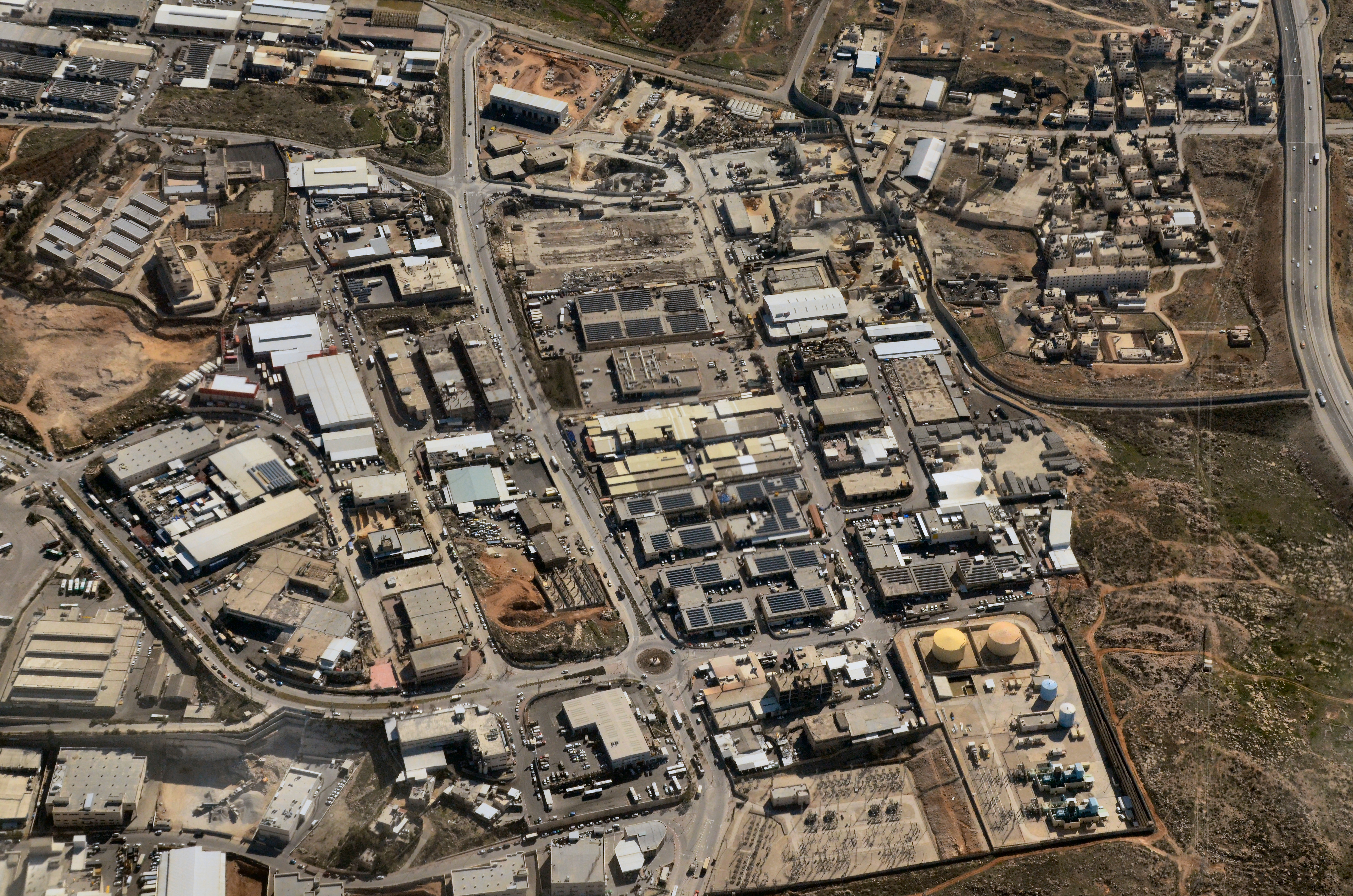 אזור תעשיה עטרות